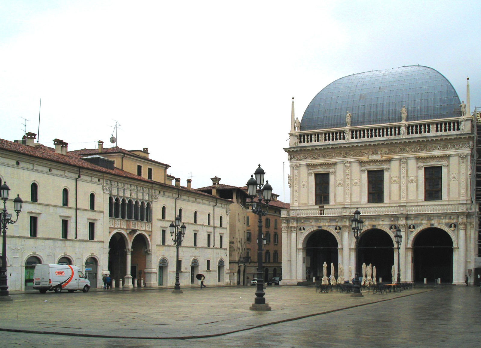 Piazza della Loggia, located in the town of Brescia in Lombardy/Italy